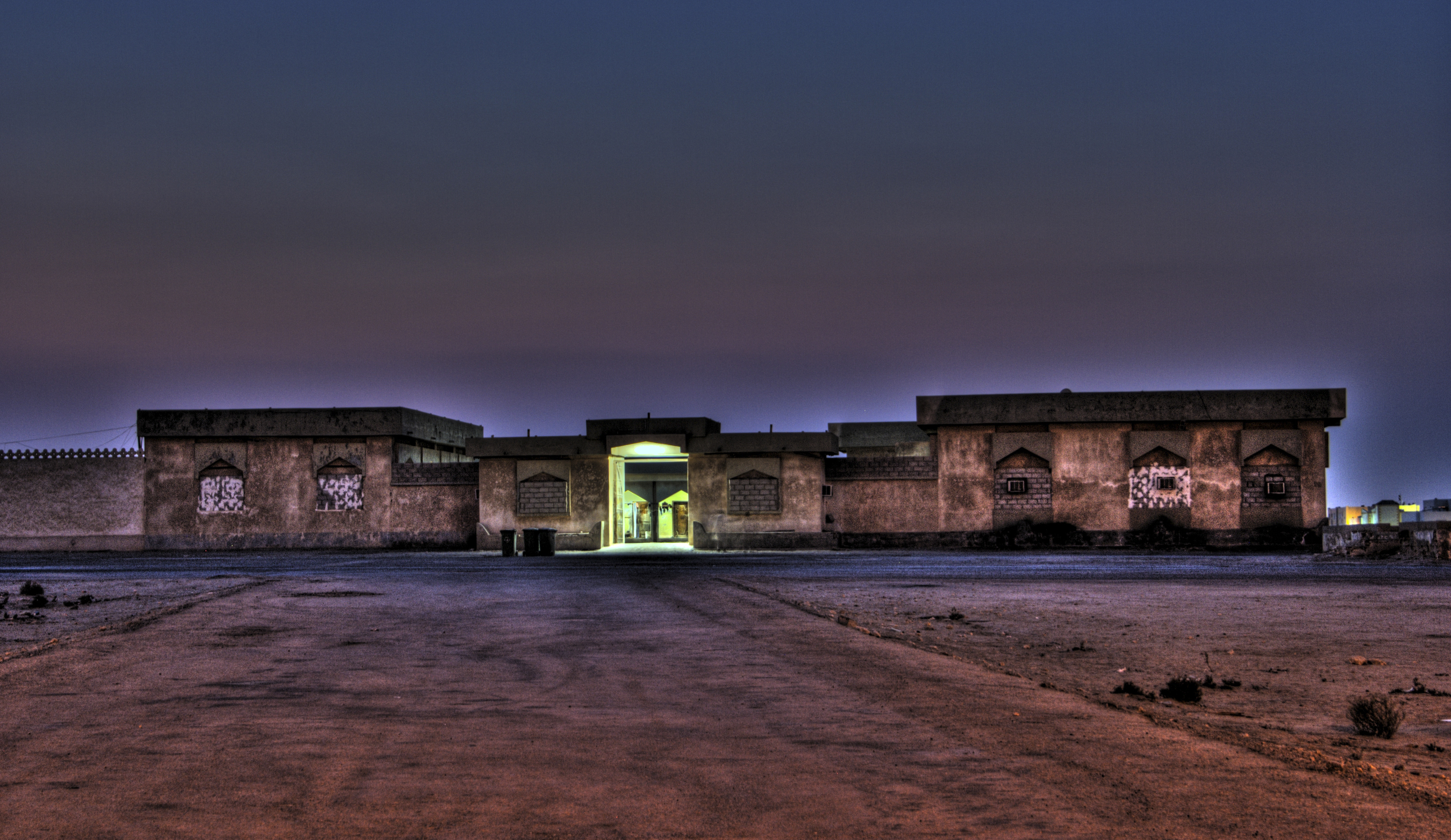 Old fort in Wakra, Qatar.